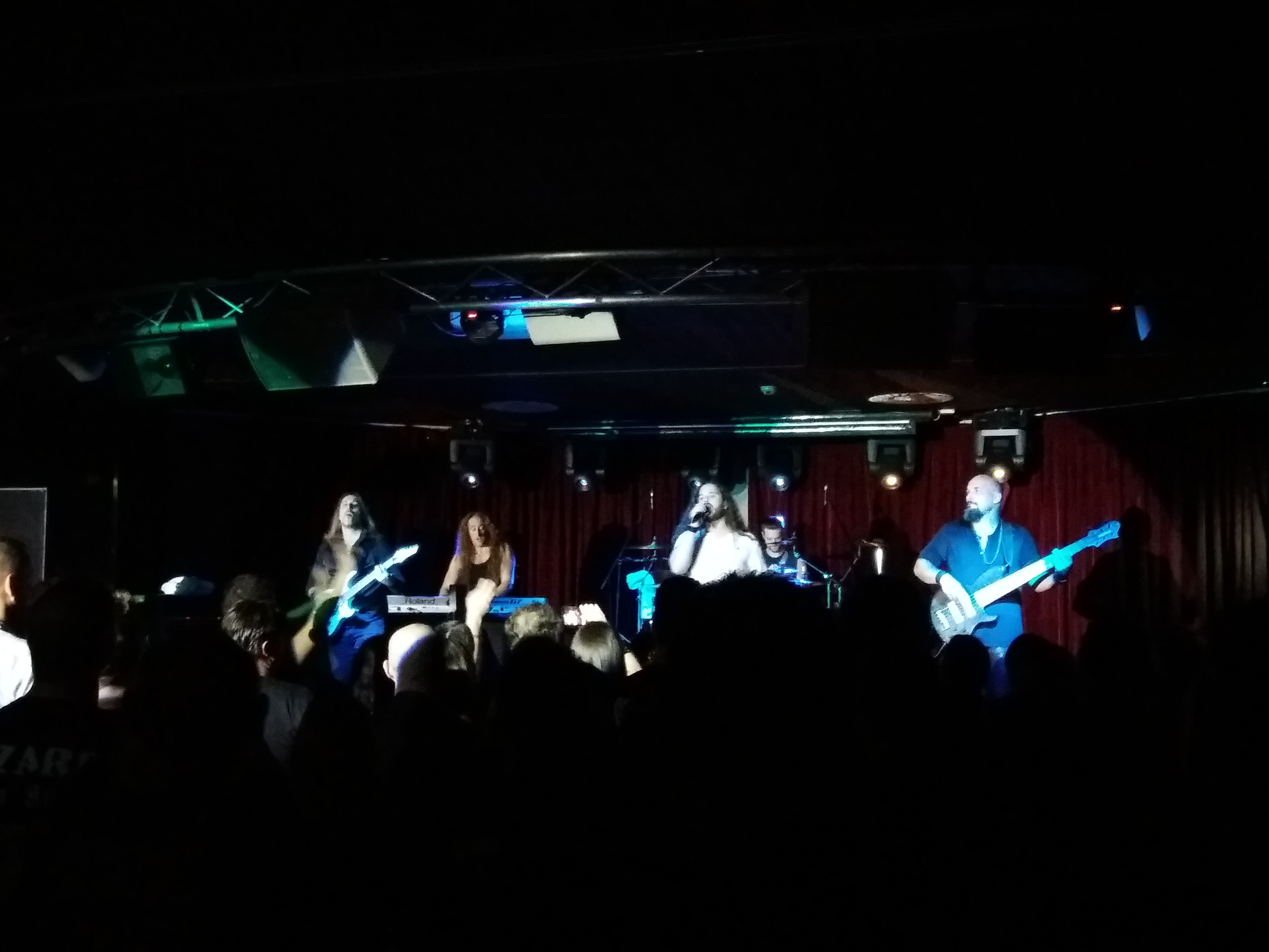 Rhapsody of Fire En Sala Acapulco Gijon España2019